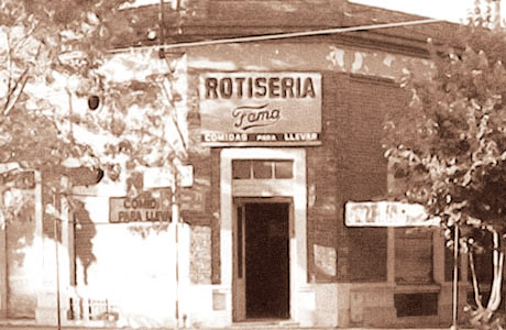 Es la fachada de la vieja Rotisería "Fama", lugar donde actualmente se encuentra el Centro Cultural Viejo Almacen El Obrero. Fue declarado Patrimonio Histórico Municipal